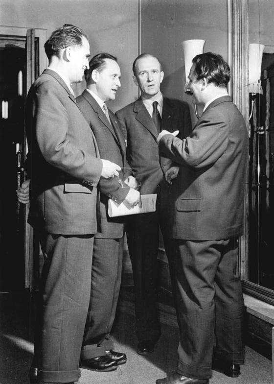 Zentralbild Schmidt 13.12.1957 III. Bundeskongress Deutscher Architekten in Leipzig. Am 12.12.1957 wurde in der Parkgaststätte in Leipzig-Markkleeberg der III. Kongress Deutscher Architekten eröffnet. An der dreitägigen Beratung nehmen 120 Architekten teil. Hauptfragen sind die Typenprojektierung im Wohnungsbau und der sozialistische Wohnkomplex im Städtebau. UBz: Während einer Kongresspause (v.l.n.r.): Hauptabteilungsleiter im Ministerium für Aufbau, Schneideratus; Staatssekretär Kosel vom Ministerium für Aufbau; Gerhart Ziller, Sekretär des ZK der SED und Chefarchitekt Henselmann, Berlin.